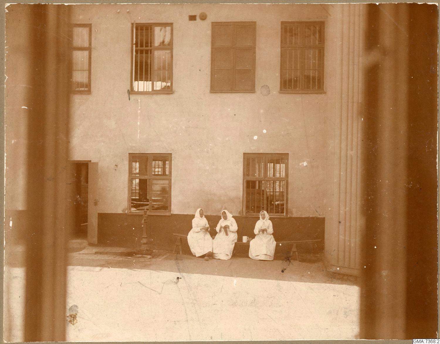 Spinnhuset, Gullbergsbro, Göteborg